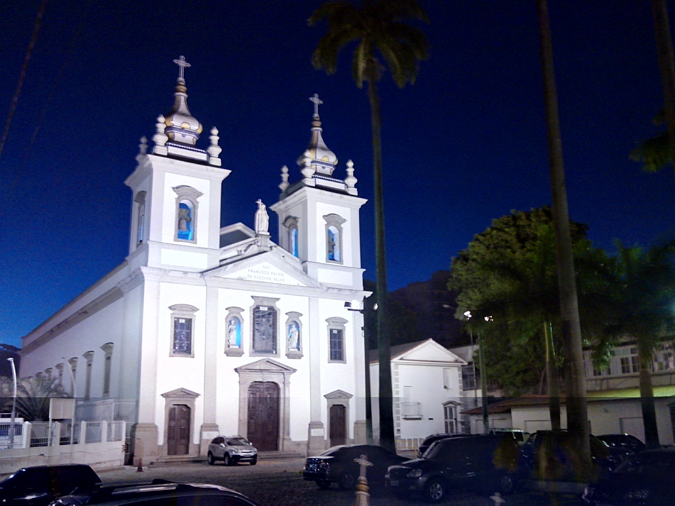 Igreja de São Francisco Xavier, localizada ao lado da estação de metrô de mesmo nome